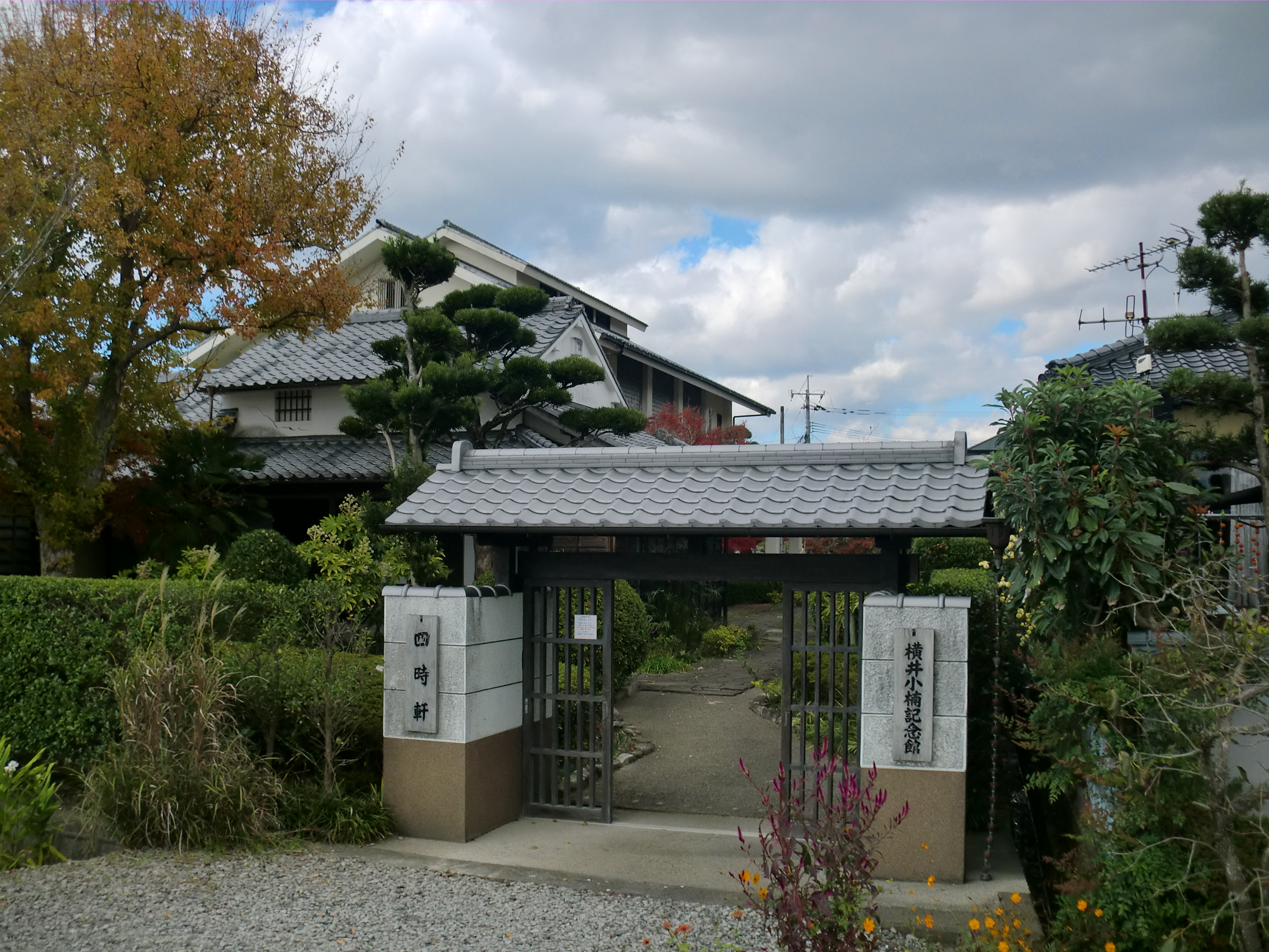 横井小楠（よこいしょうなん）記念館裏門